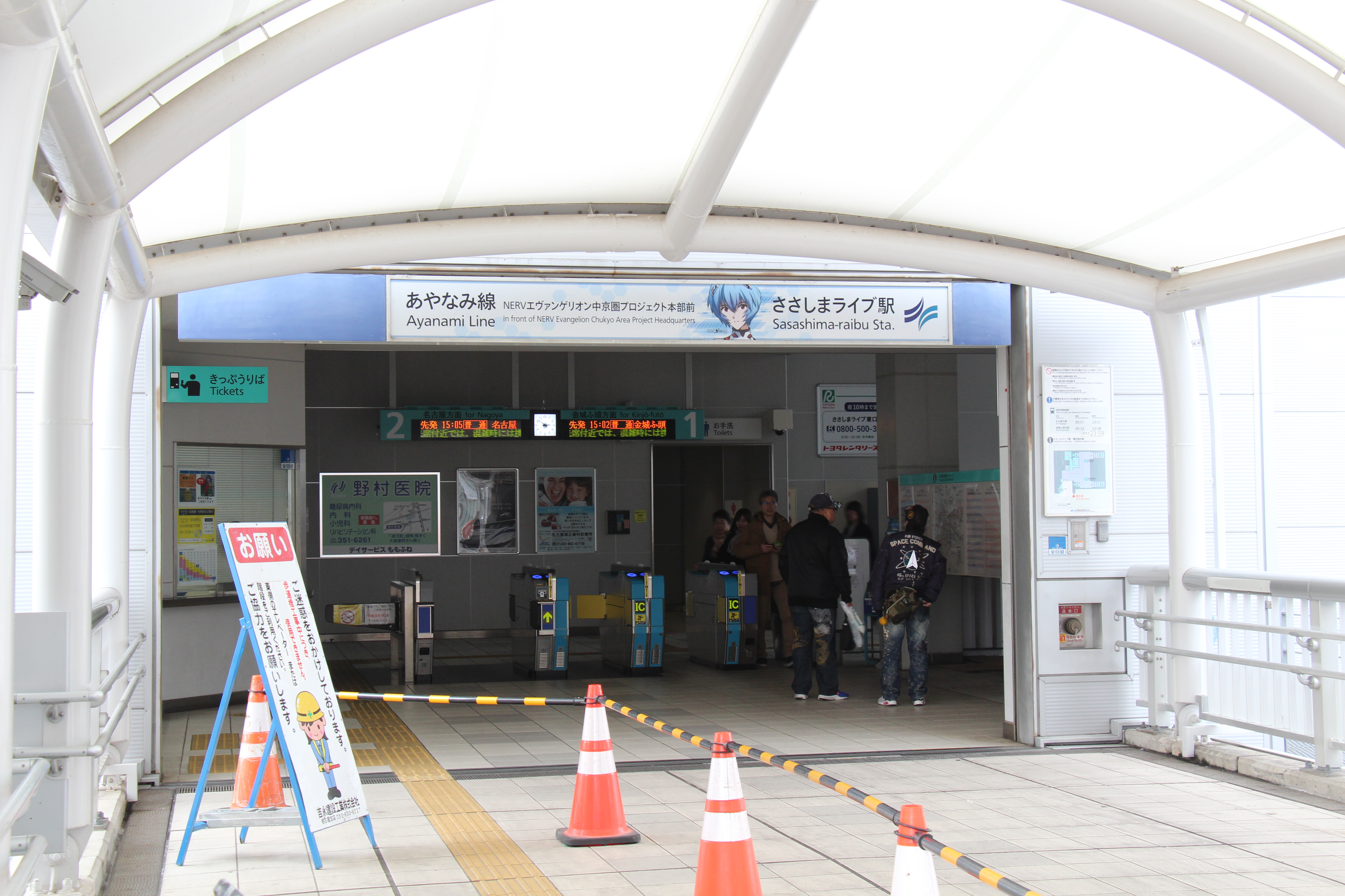 ささしまライブ駅改札口。 「エヴァンゲリオン中京圏プロジェクト〜名古屋・ささしまライブから世界へ発信〜」に伴って、2020年1月17日から3月31日（予定）まで駅名看板が掛け替えられる。